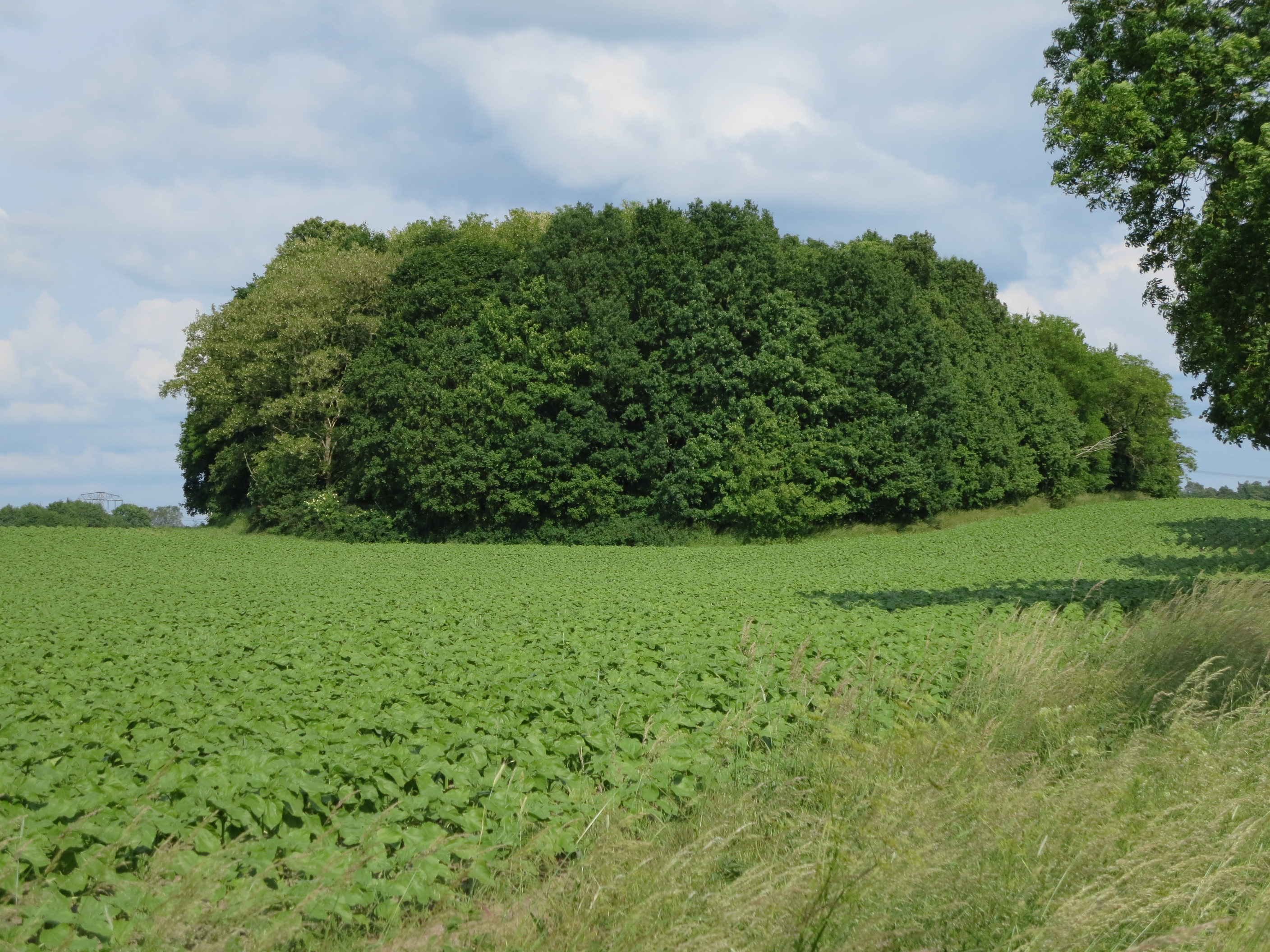 Bewaldeter Kellerberg in Grüntal, Brandenburg.